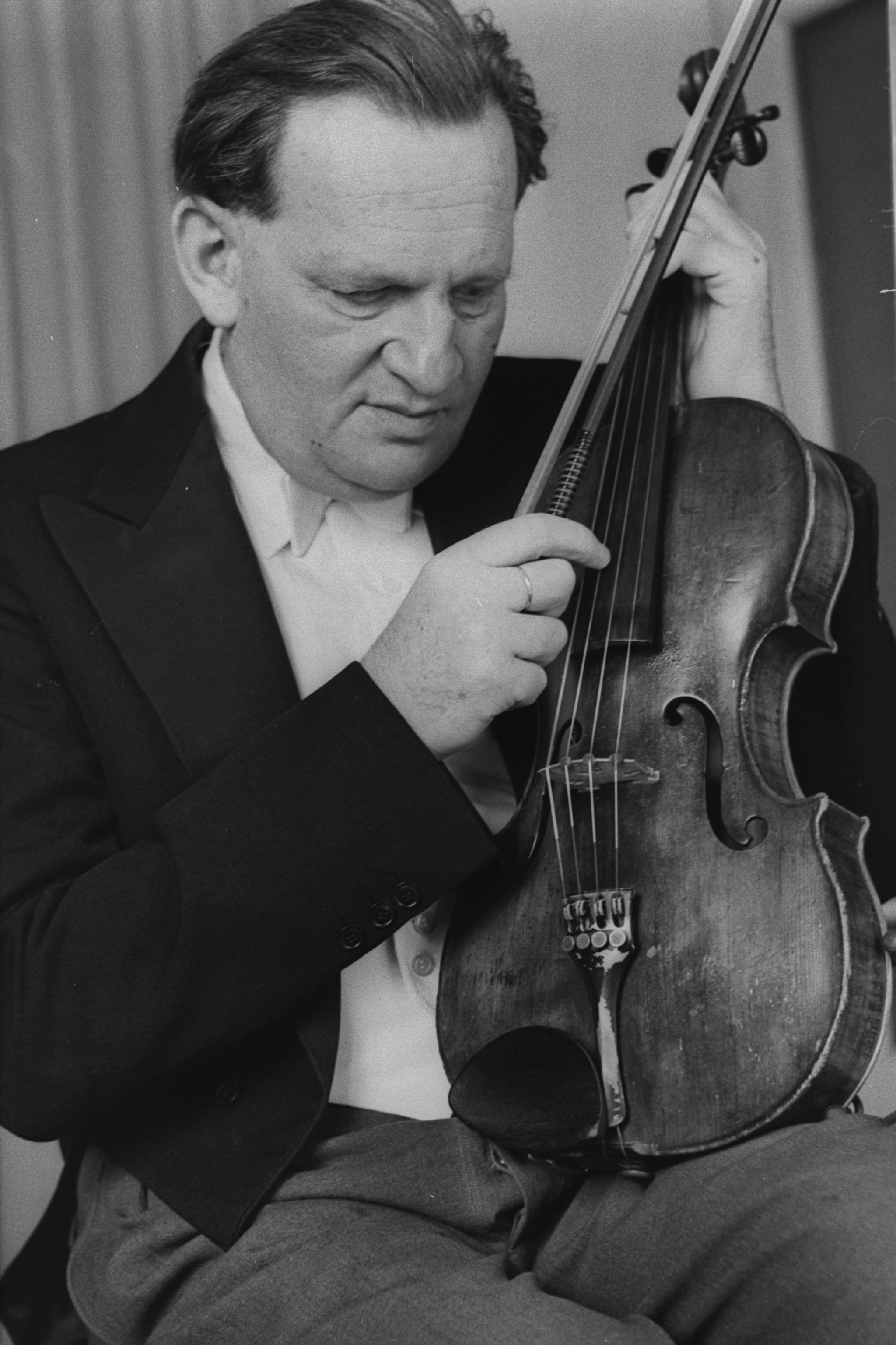 Israeli Musician Eodeon Partos, 1957